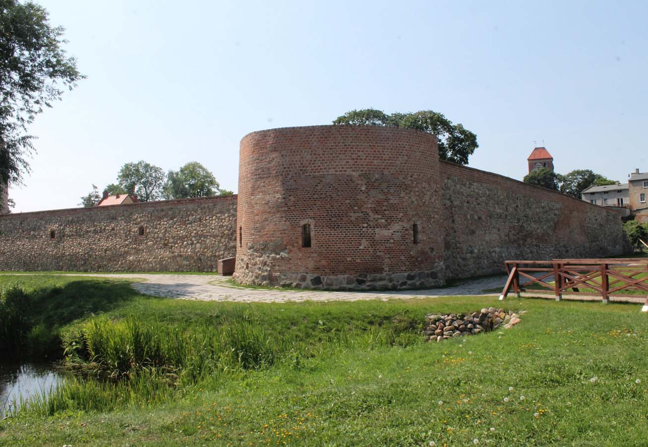 ruiny zamku w Lubawie po renowacji